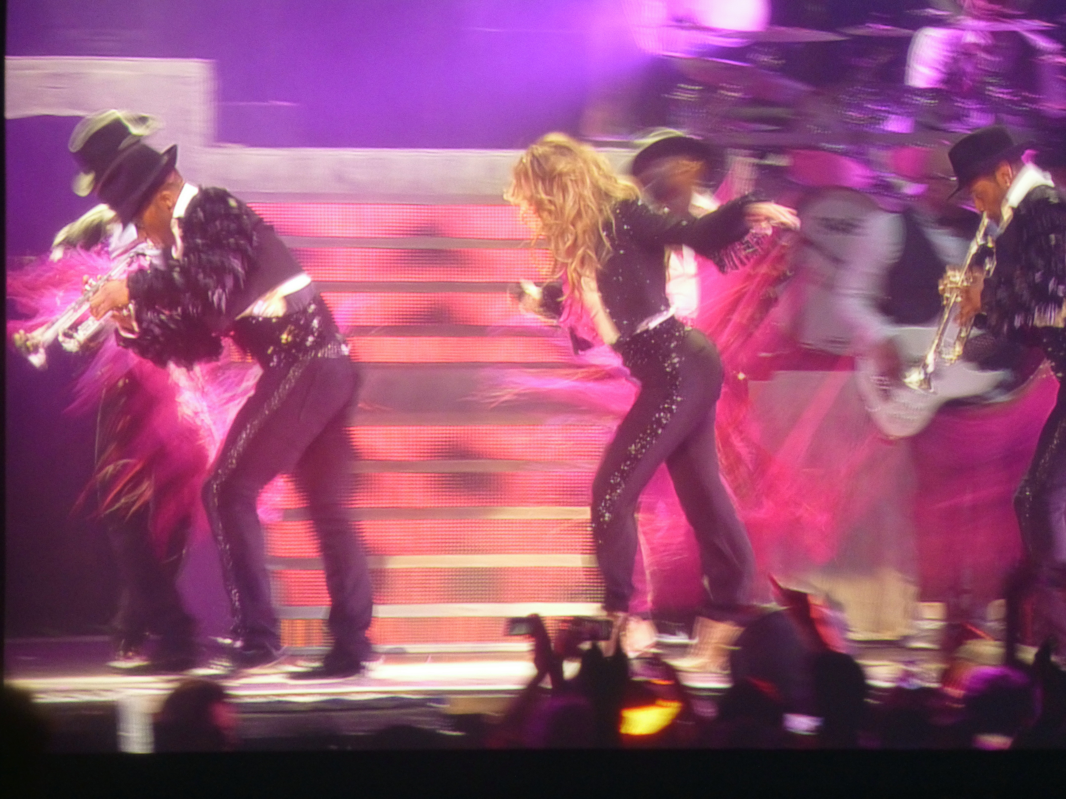 Jennifer LOPEZ en concert à Paris Bercy dans le cadre du " DANCE AGAIN WORLD TOUR " en OCTOBRE 2012